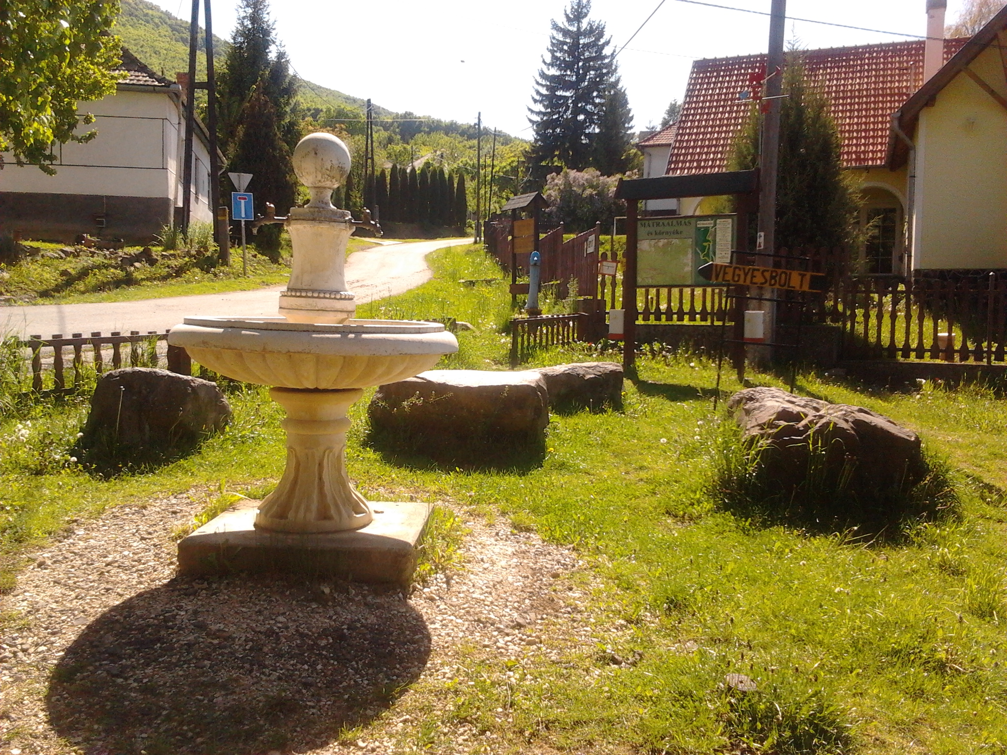 Régen